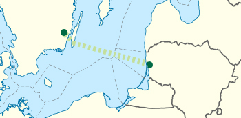 NordBalt jungtis